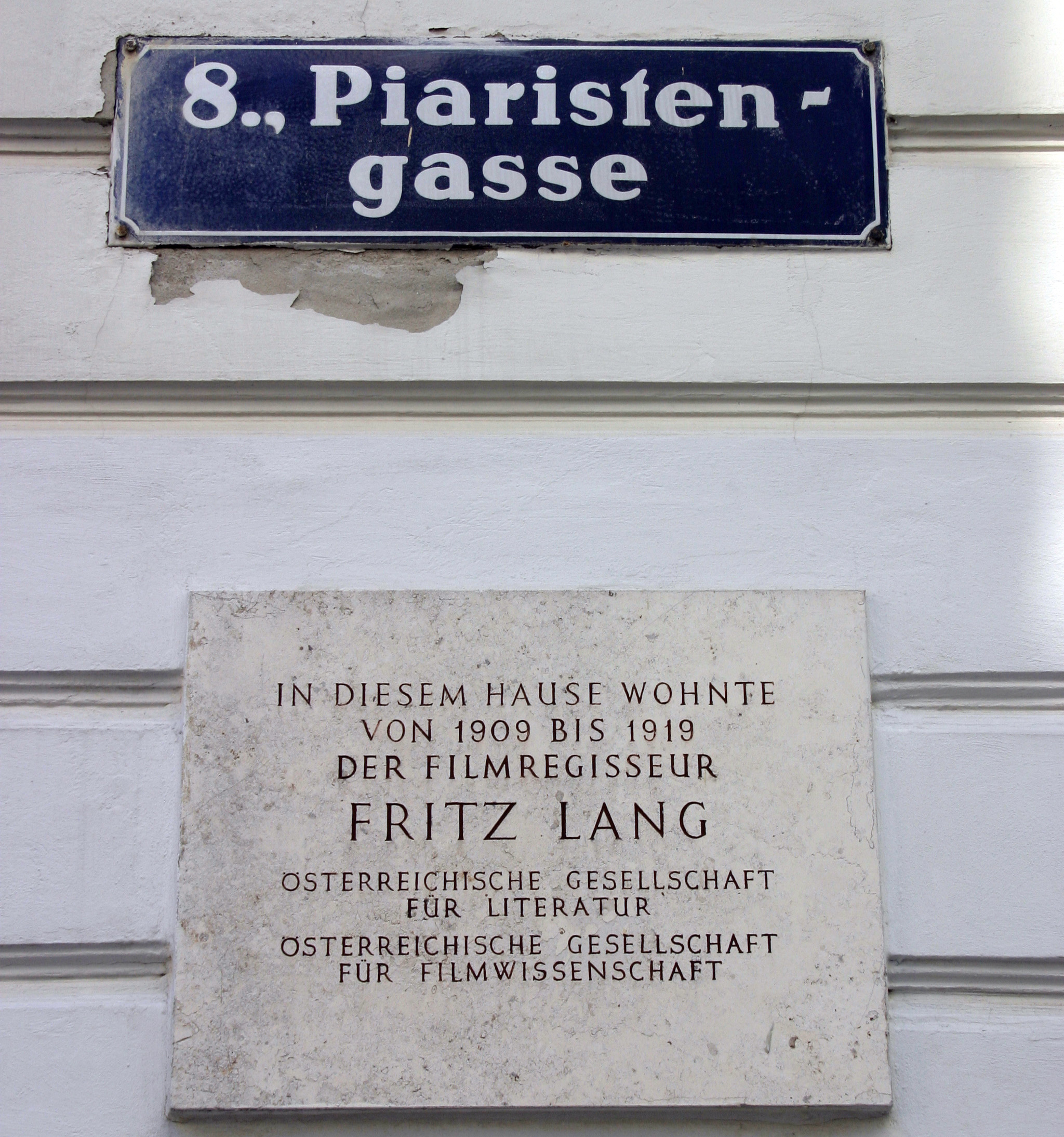 Josefstadt in Wien